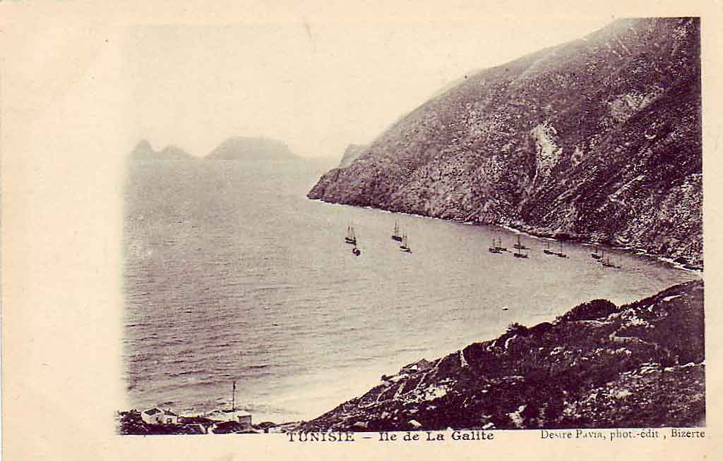 Photo prise vers 1900 durant la saison de pêche. En bas à gauche, on voit la maison du garde-pêche avec le pylône de l'antenne radio et, à l'horizon, les îles du Galiton et des Chiens. Bertrand Bouret - Collection particulière